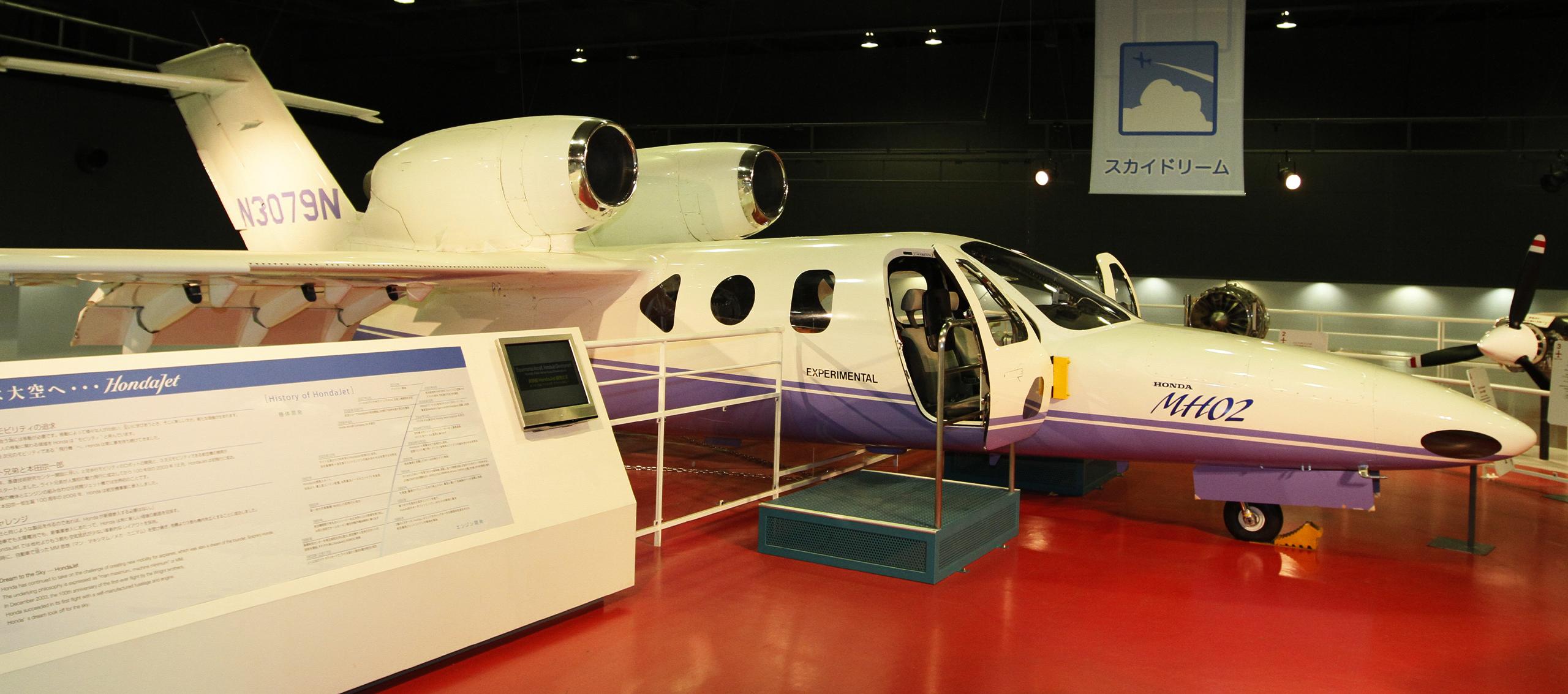 Honda MH02 experimental aircraft